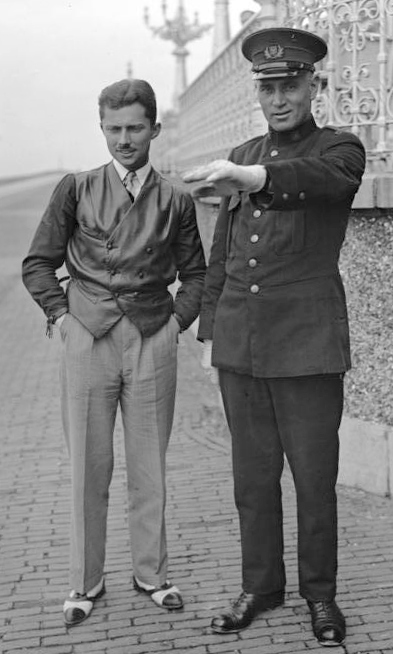 Bei den deutschen Olympia-Teilnehmern in Zandvoort / Holland! Der deutsche Kurzstreckenmeister Koernig im Unterhaltung mit einem holländischen Schutzmann.